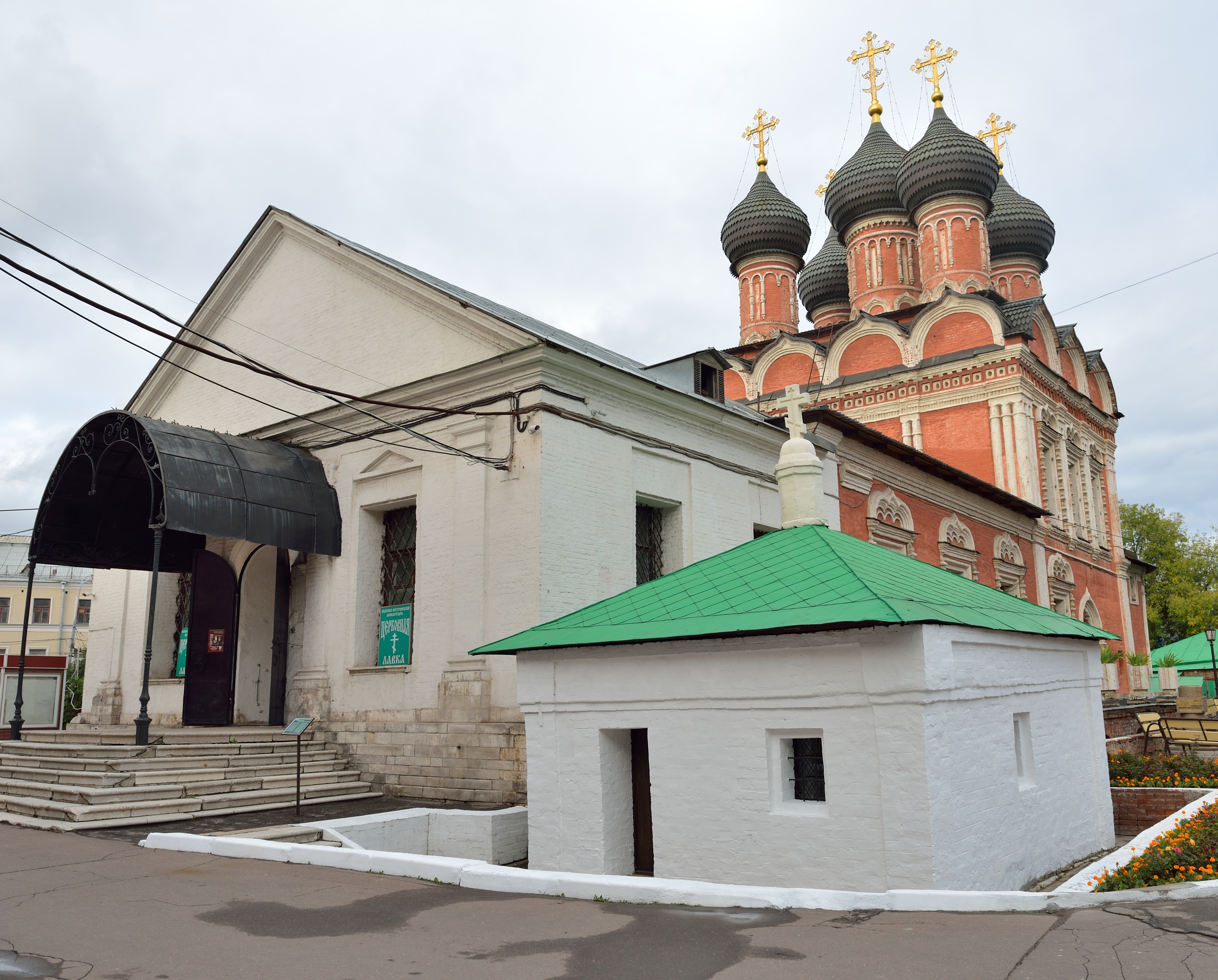 Боголюбская церковь; часовня-склеп: Петровка ул., дом 28, строение 13, Тверской, Центральный округ, Москва